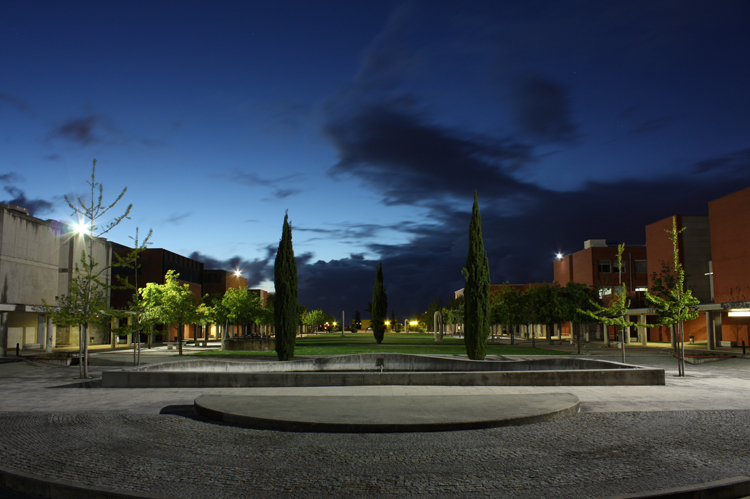 Fotografia com os vários departamentos da Universidade de Aveiro